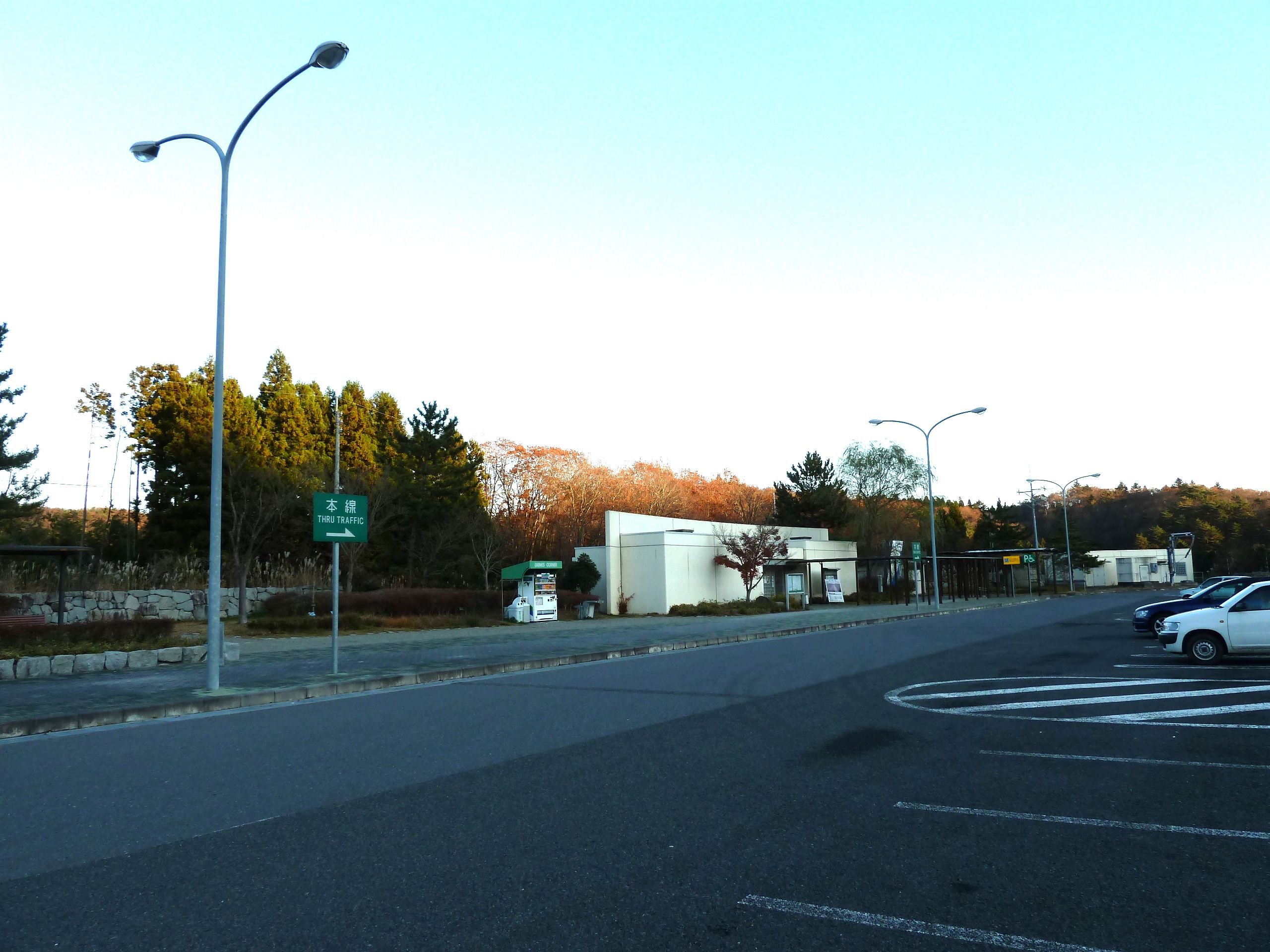 磐越自動車道 差塩パーキングエリア（上り線）